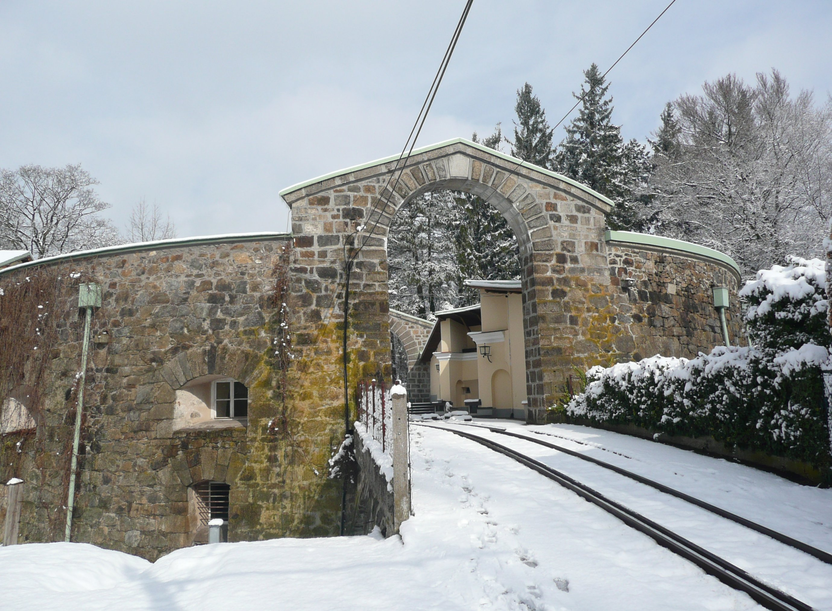 Turm IV (Maria)